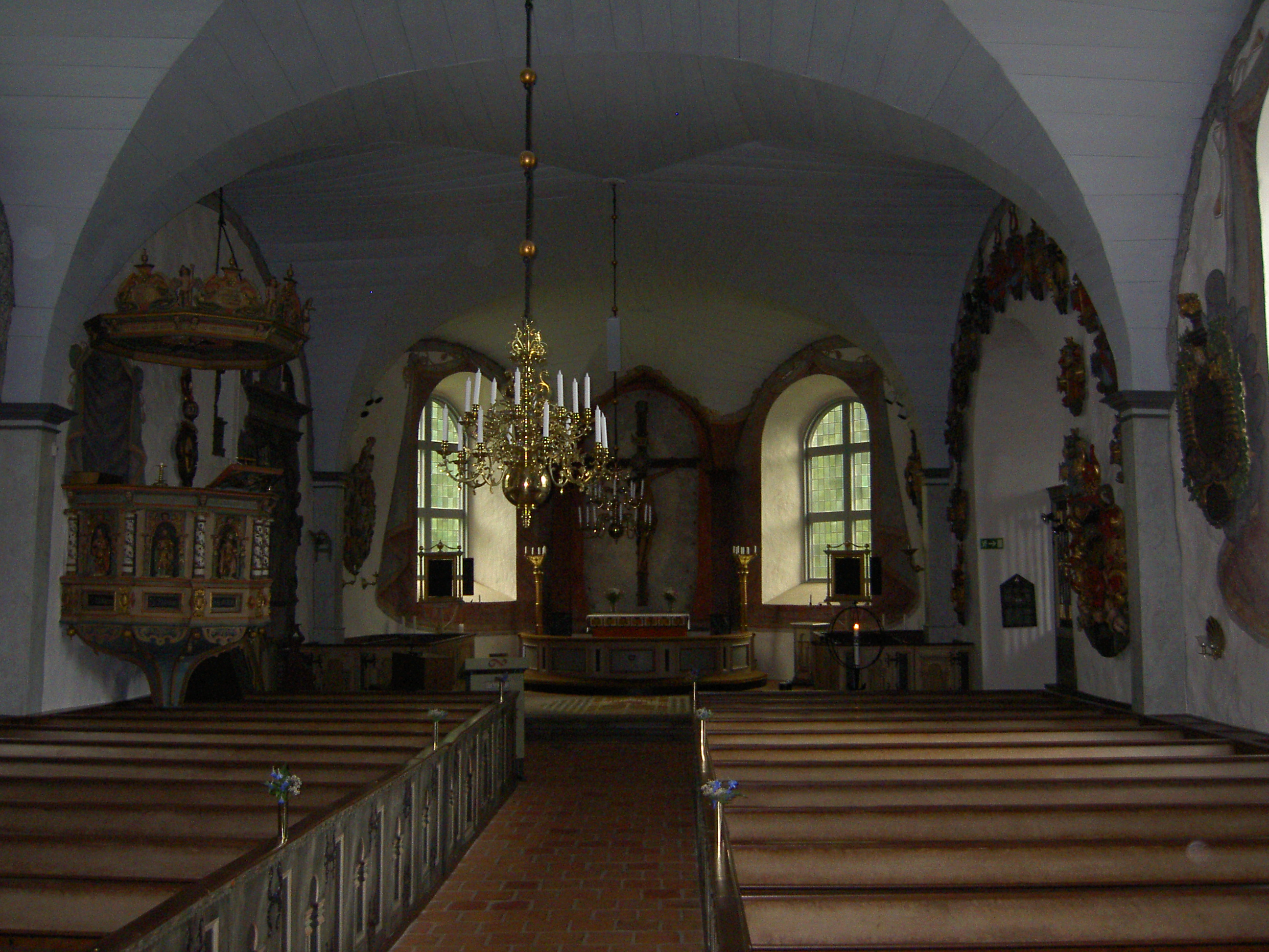 Kyrkorum i Norra Fågelås kyrka